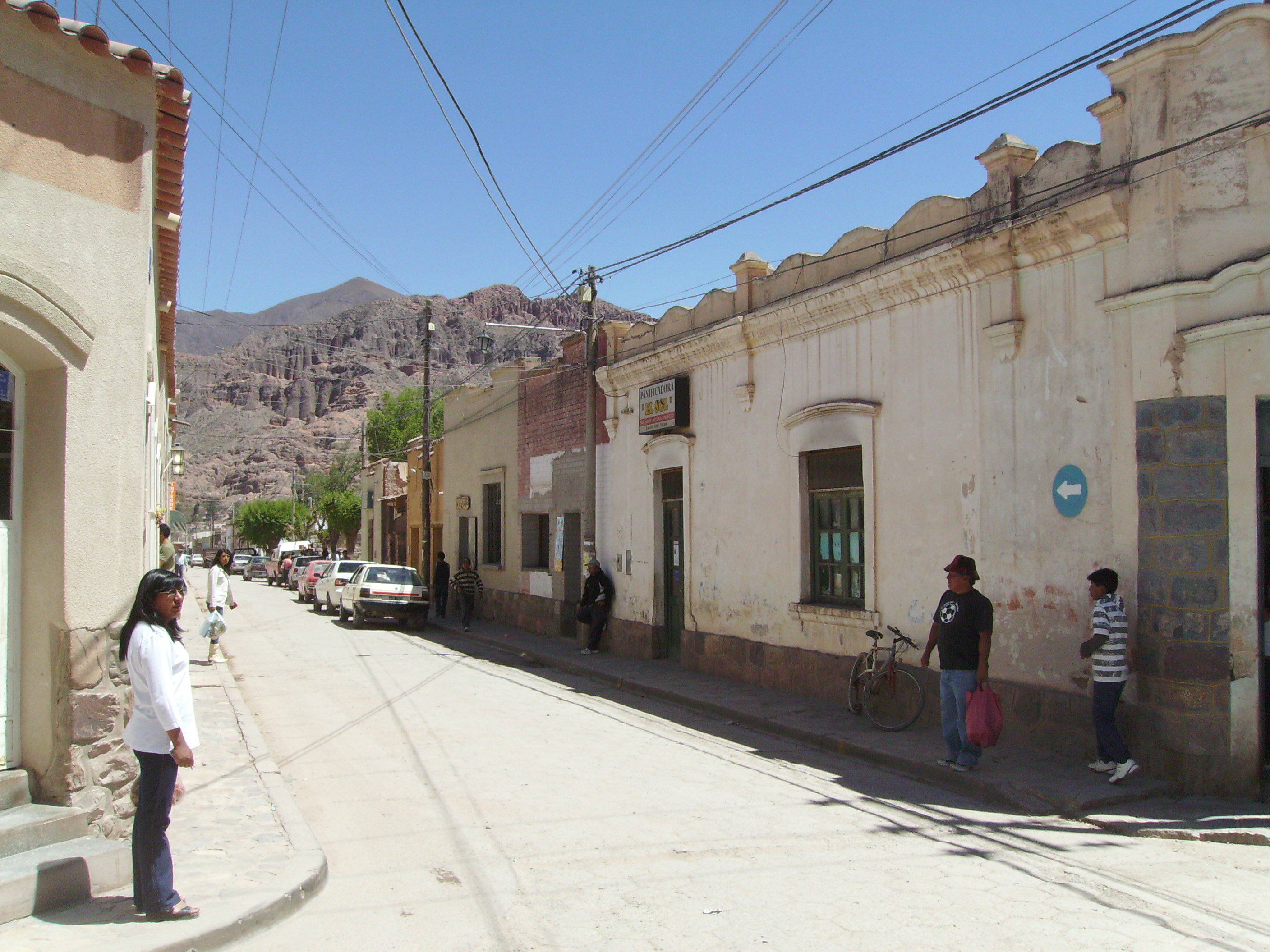 Tilcara (Quebrada de Humahuaca) - Juyjuy - Argentina